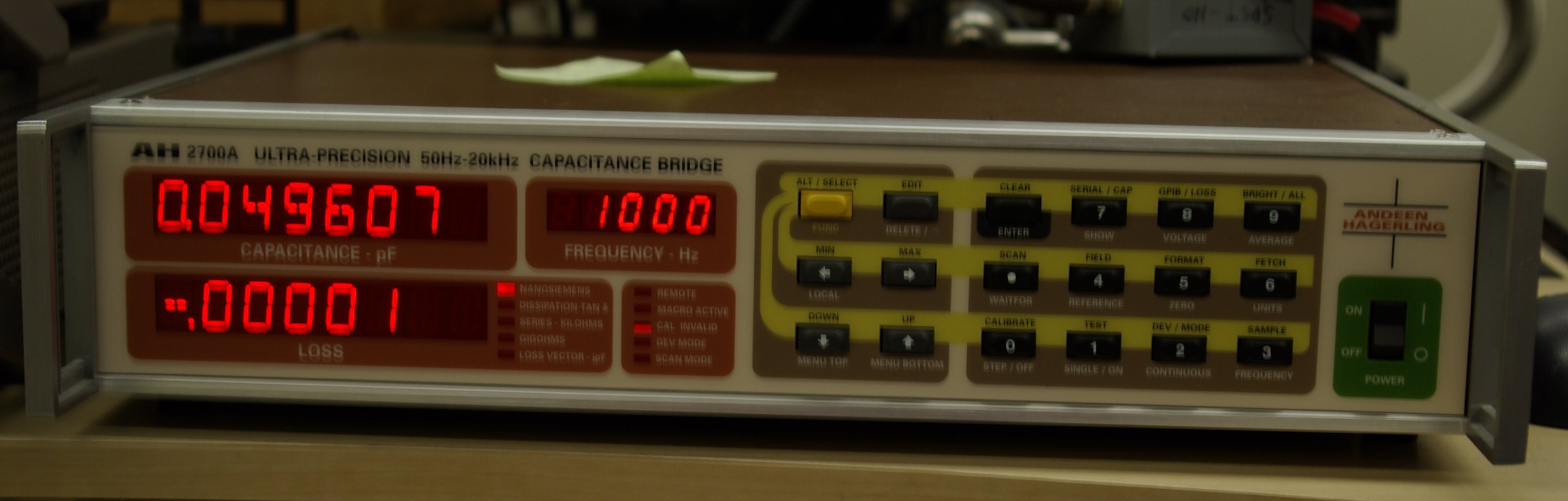 An Andeen-Hagerling 2700A capacitance bridge